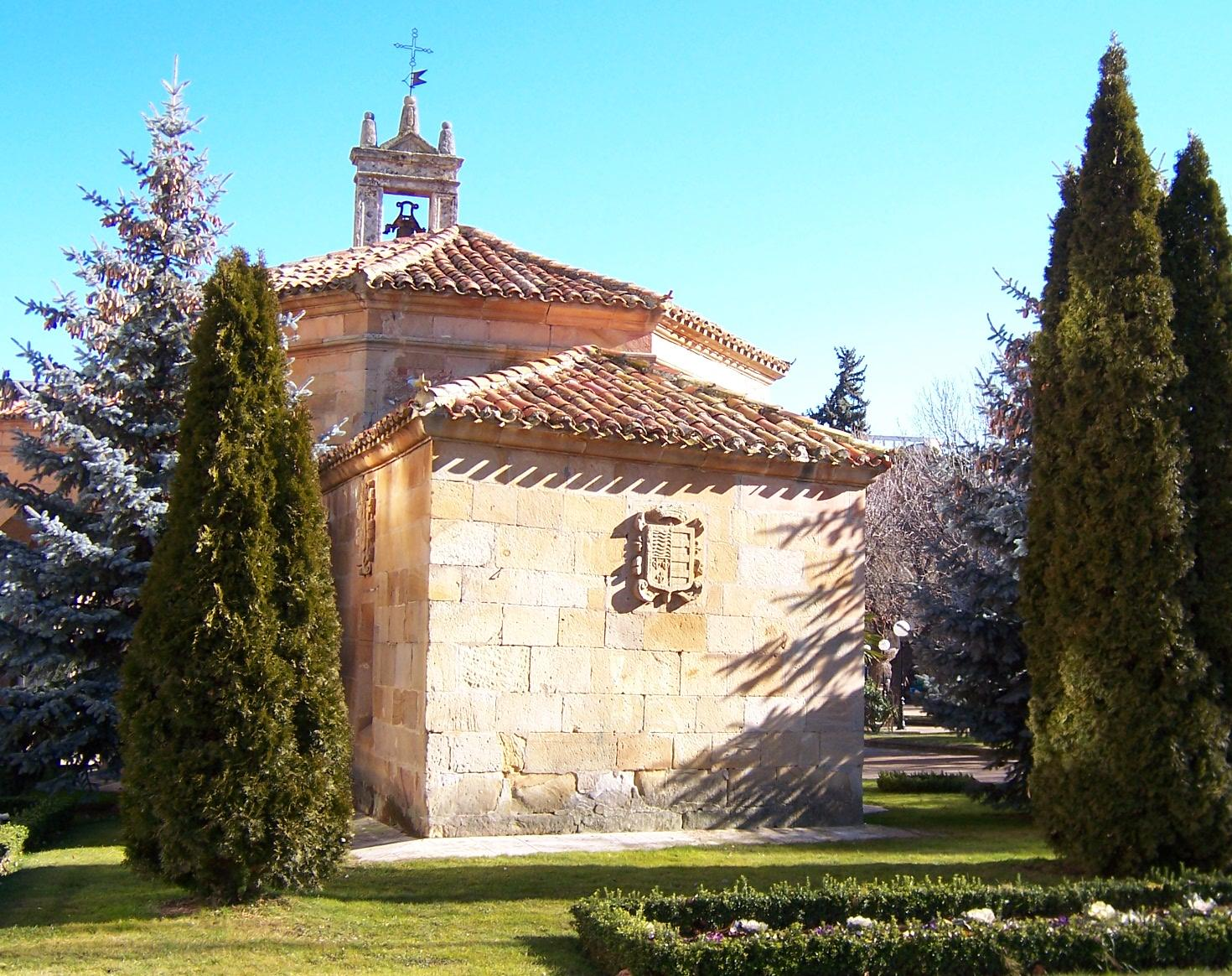 Iglesia de La Soledad en Soria / church La Soledad in Soria foto tomada por mí mismo / photo taken by myself